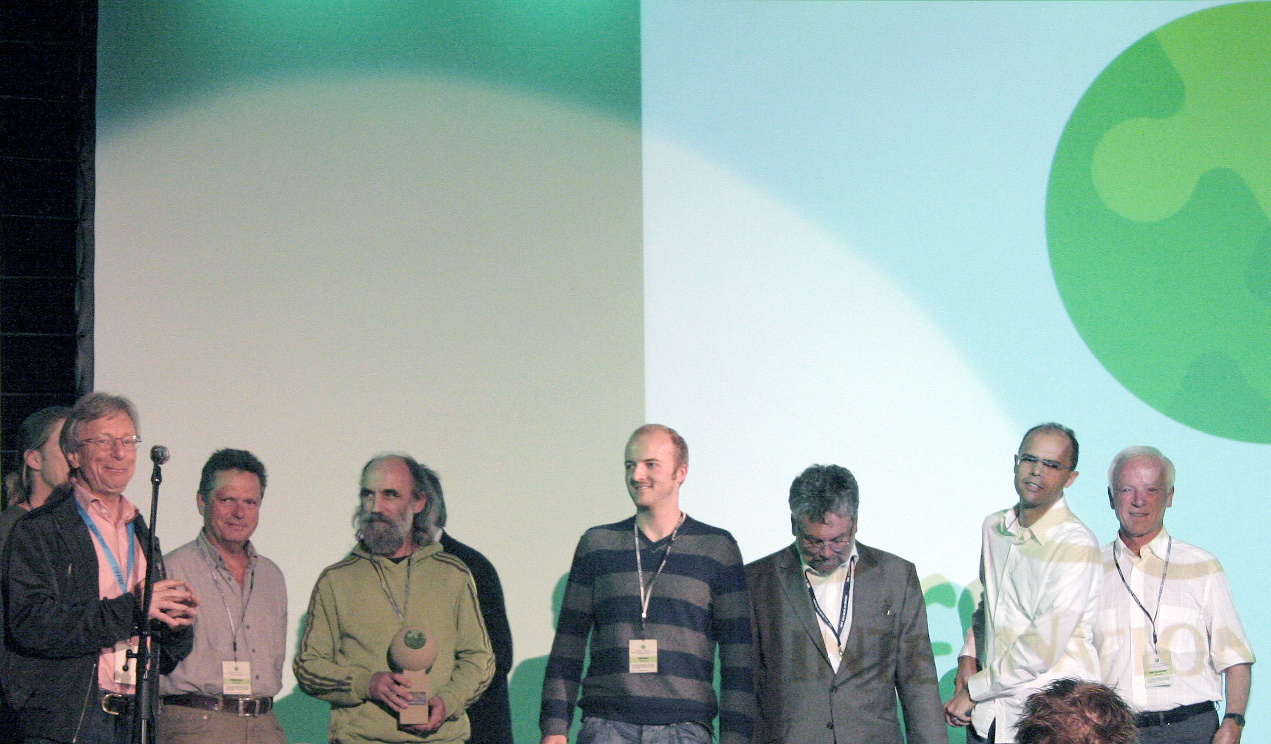 Preisverleihung "Bester Wissenschaftsfilm" für Kluge Pflanzen 2 - Blattgeflüster beim Internationalen Naturfilmfestival "Green Screen" 2009 in Eckernförde: Volker Arzt (links) mit Film-Crew und Preis-Trophäe.